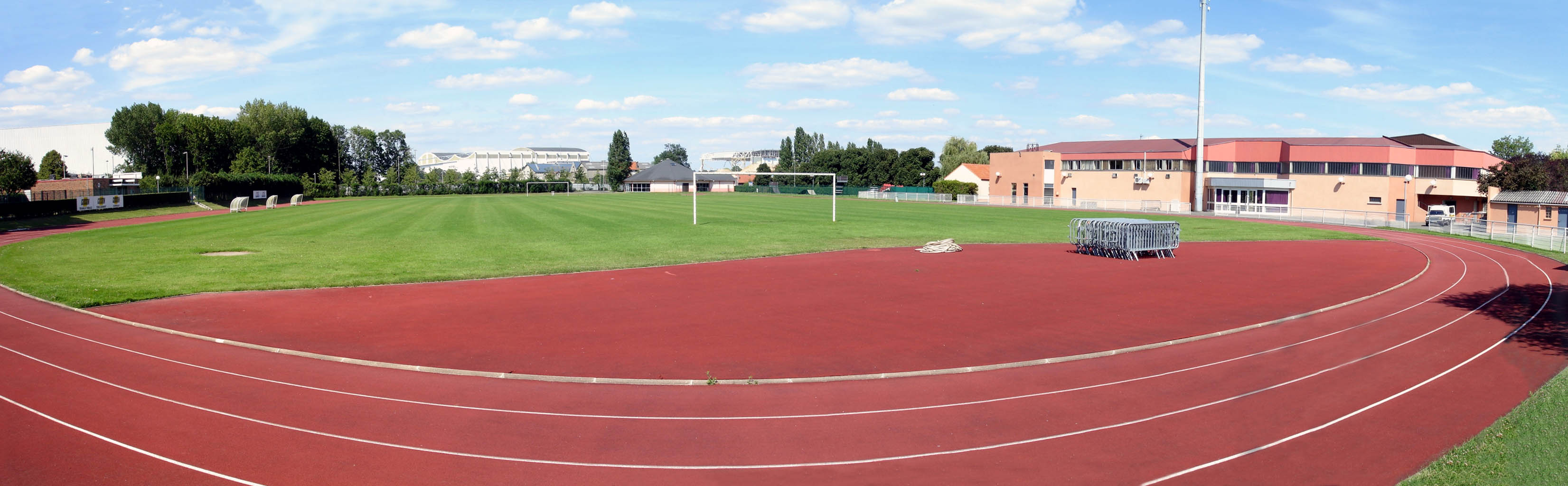 Terrain d'honneur du complexe sportif des Tournelles à Roissy-en-France (Val-d'Oise), France Au fond, les hangars de la zone d'entretien d'Air France sur la zone aéroportuaire. Juillet 2007 Photo personnelle (own work) de Clicsouris